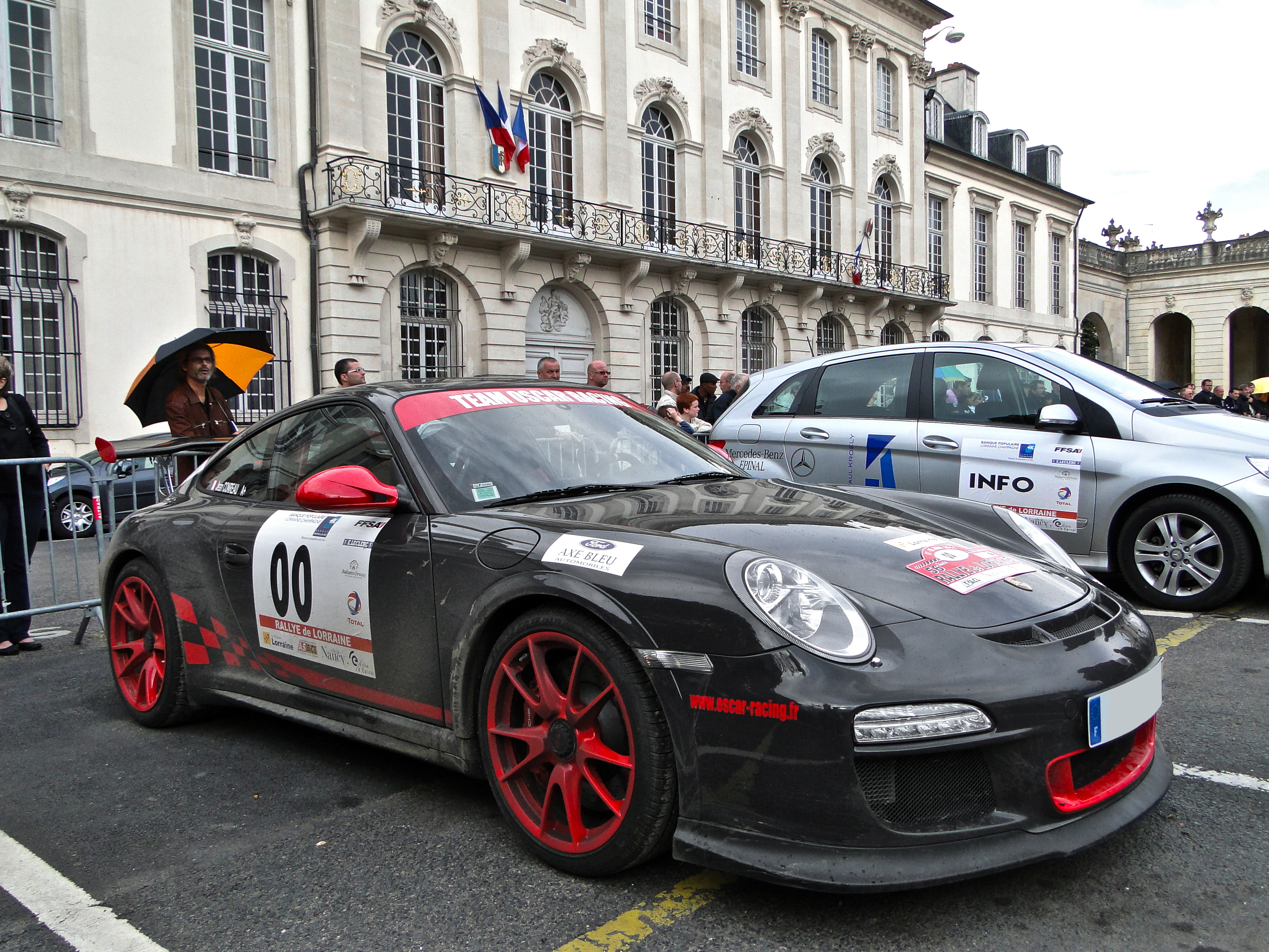 Porsche 911 GT3 RS